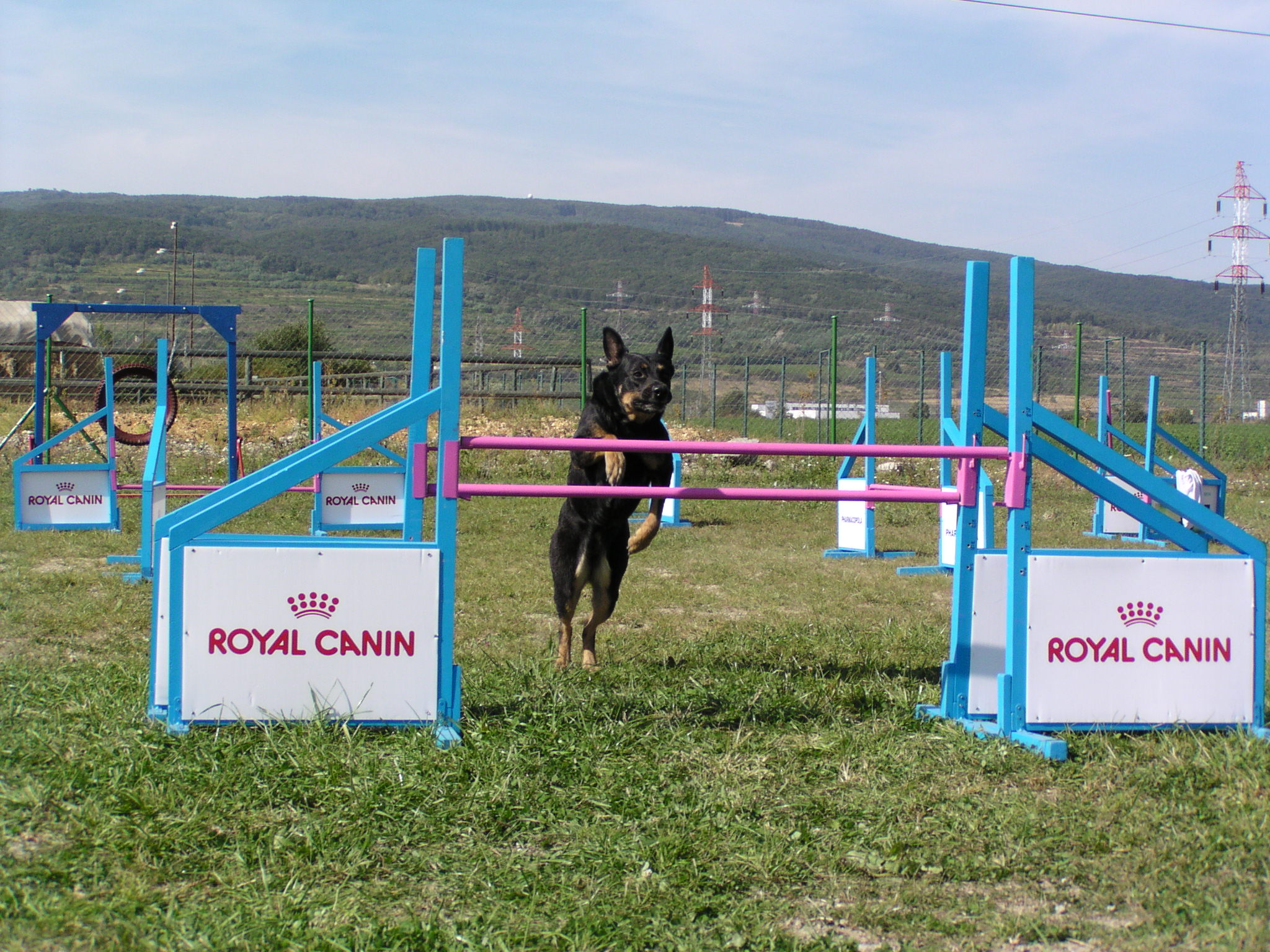 photo by Martina Vakoničová (